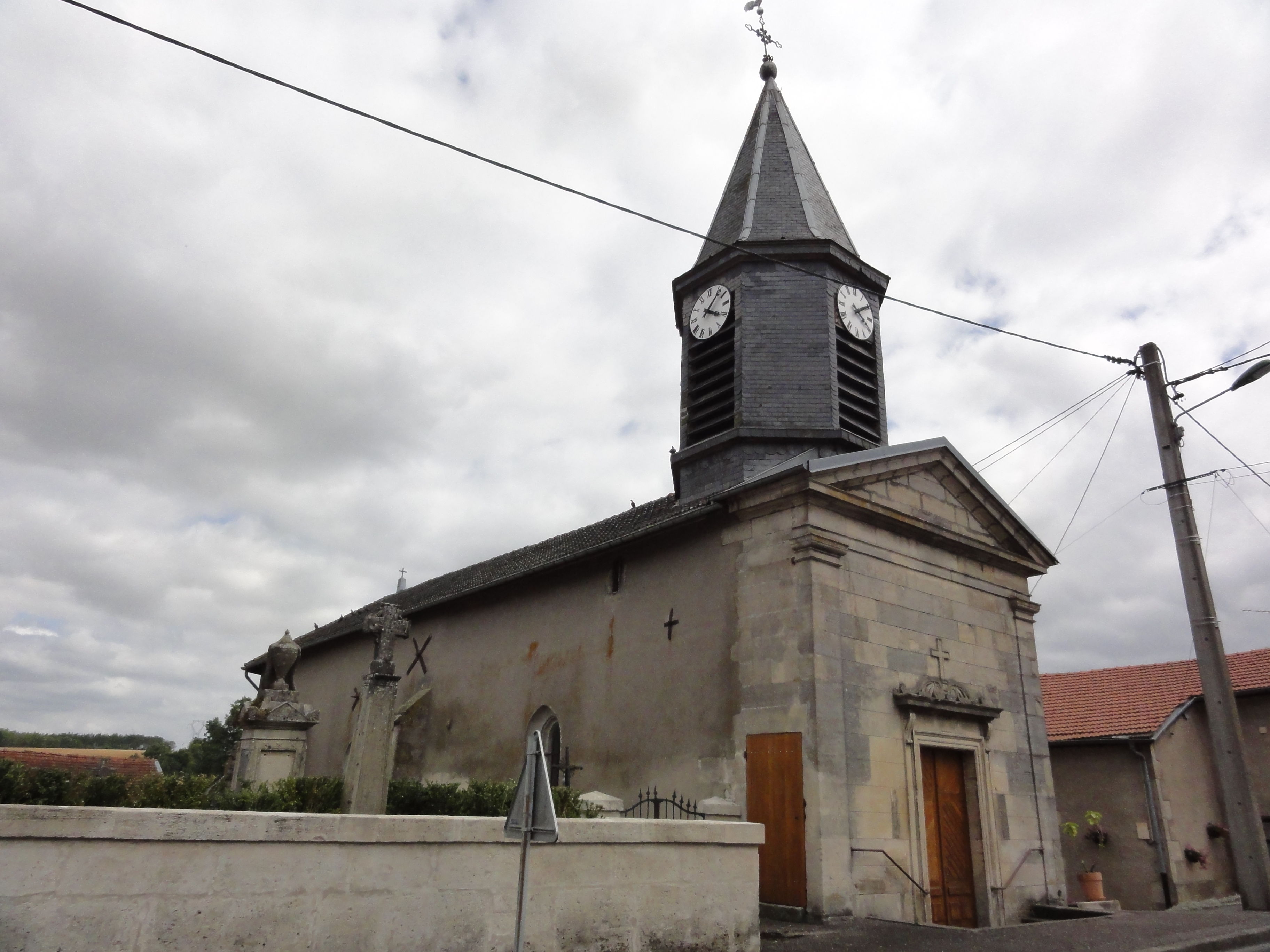 Rumont (Meuse) église